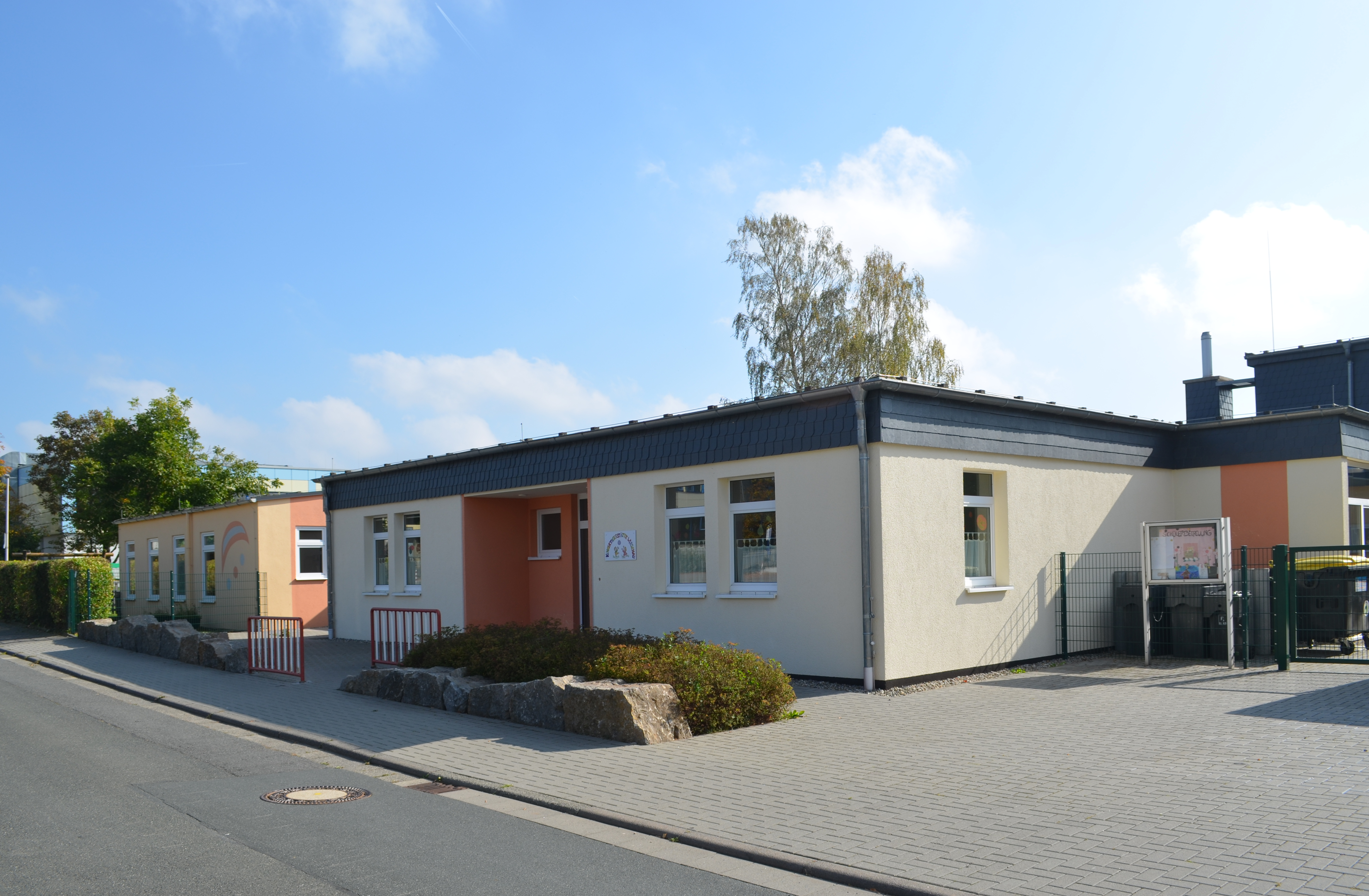 Wehrheim, Kindergarten Wiesenau